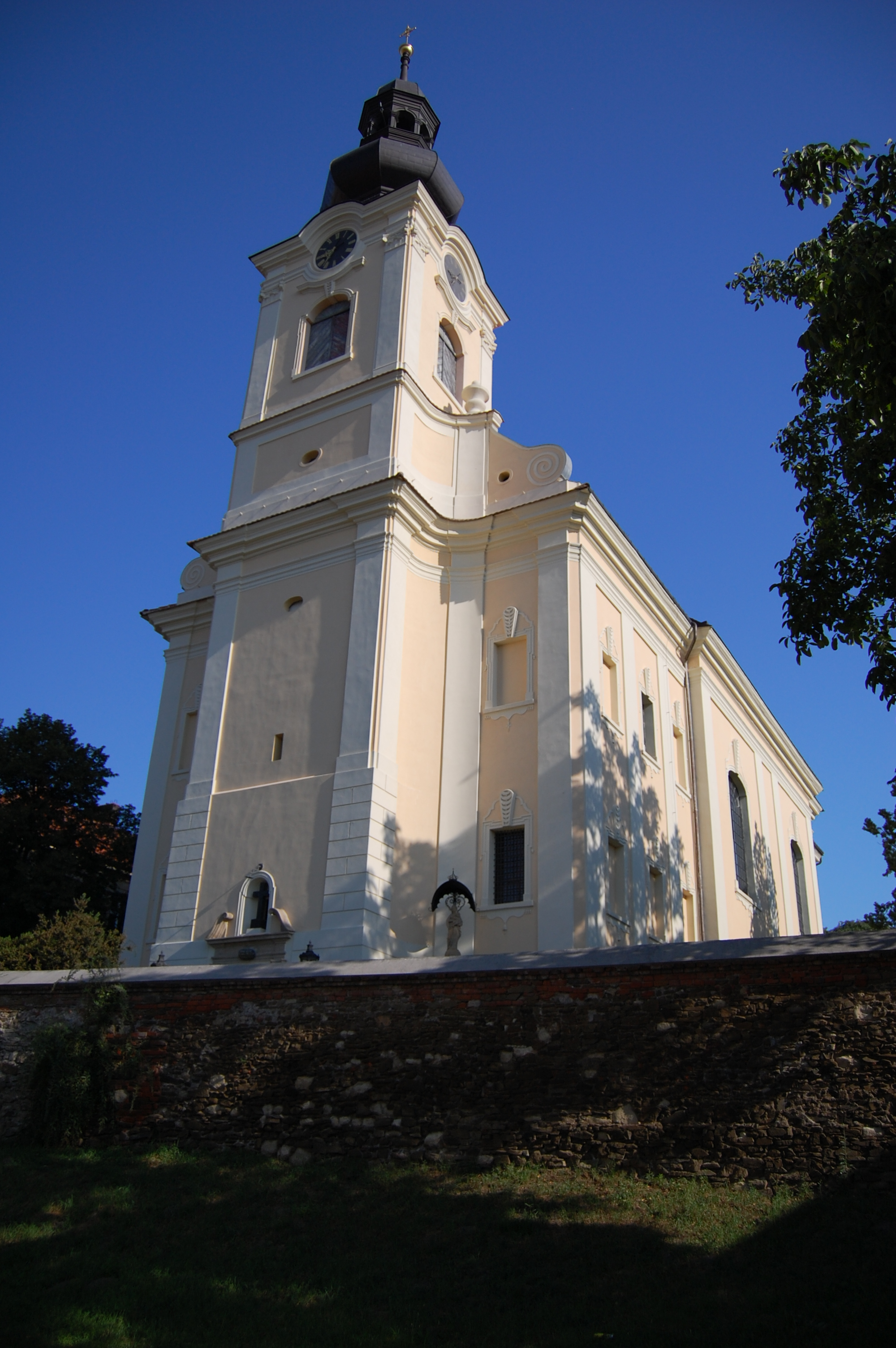 Kostel svatého Jakuba, Kostelec na Hané, okres Prostějov